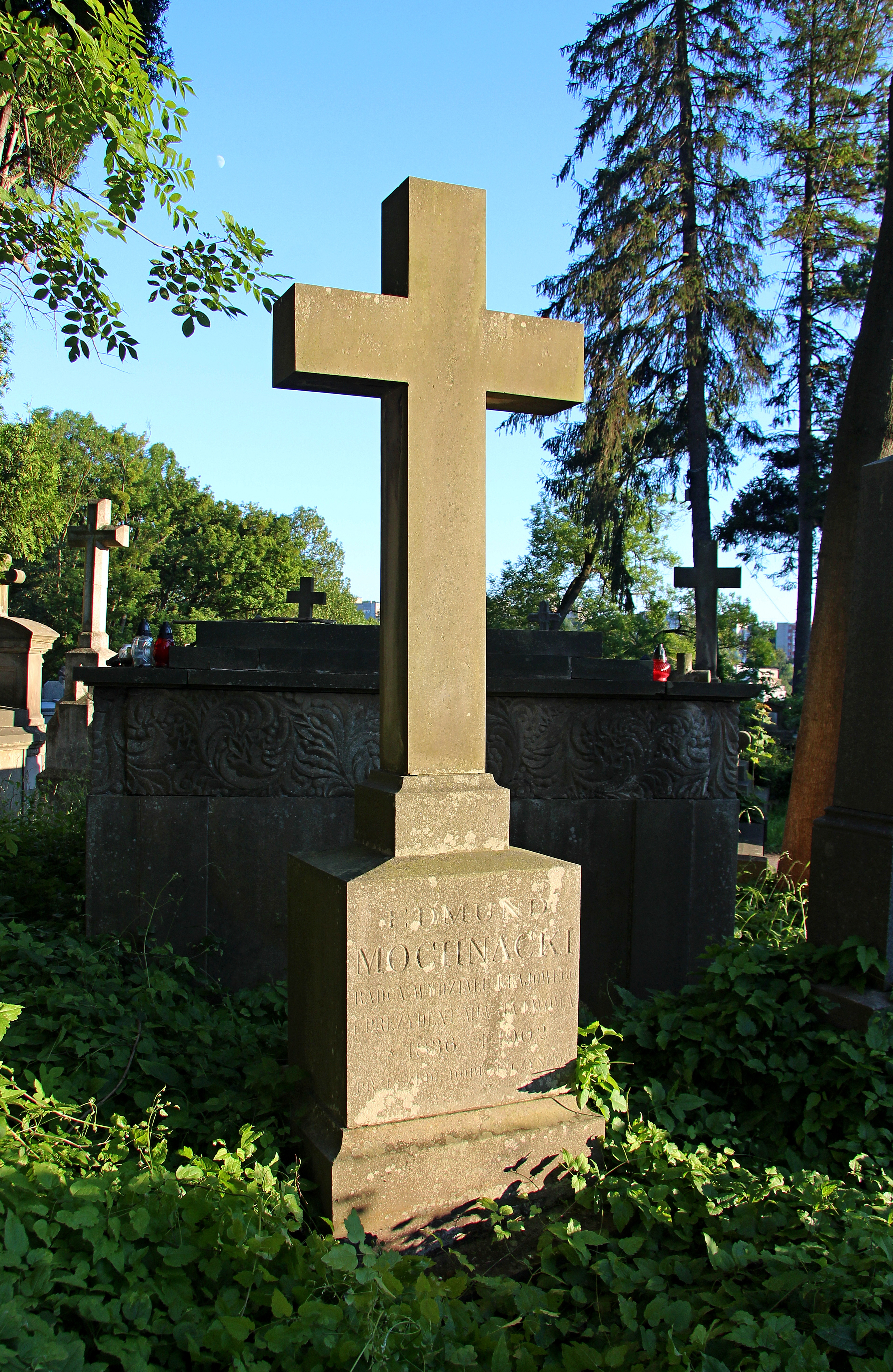 Пам'ятник на могилі Е. Мохнацького .Личаківський цвинтар , поле № 71.